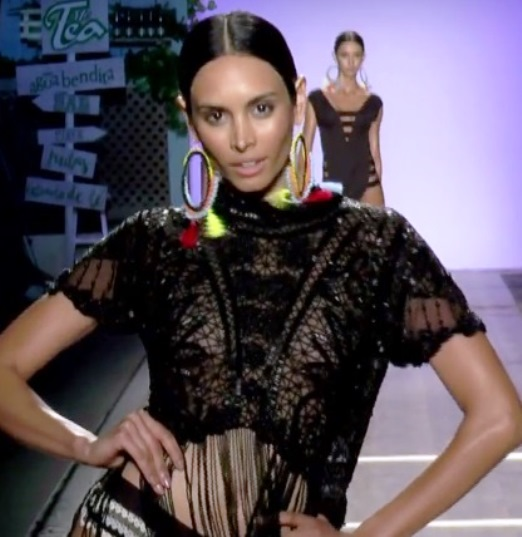 Vanessa Pulgarín en la pasarela de Agua Bendita (2016)